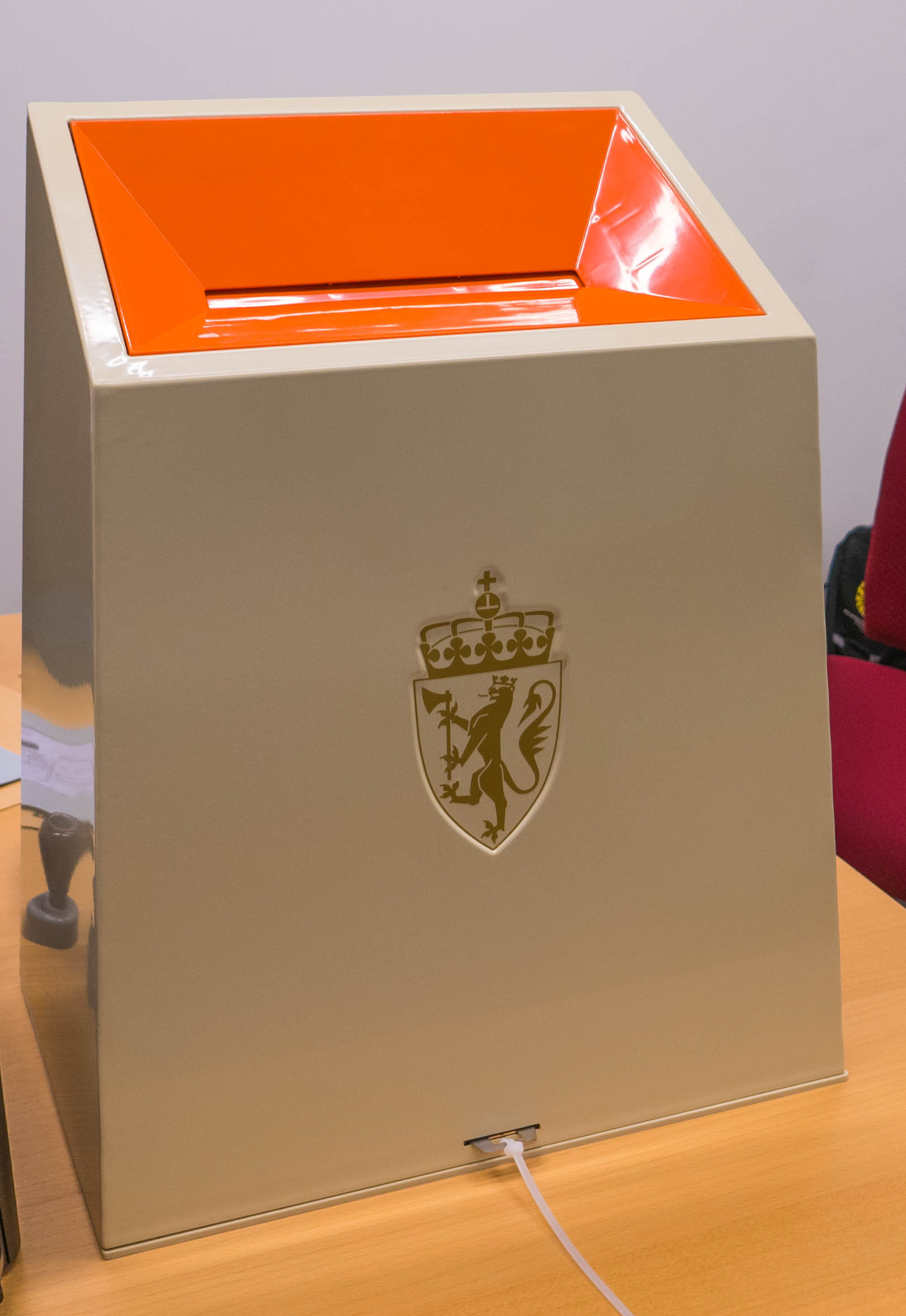 Norsk moderne stemmeurne.